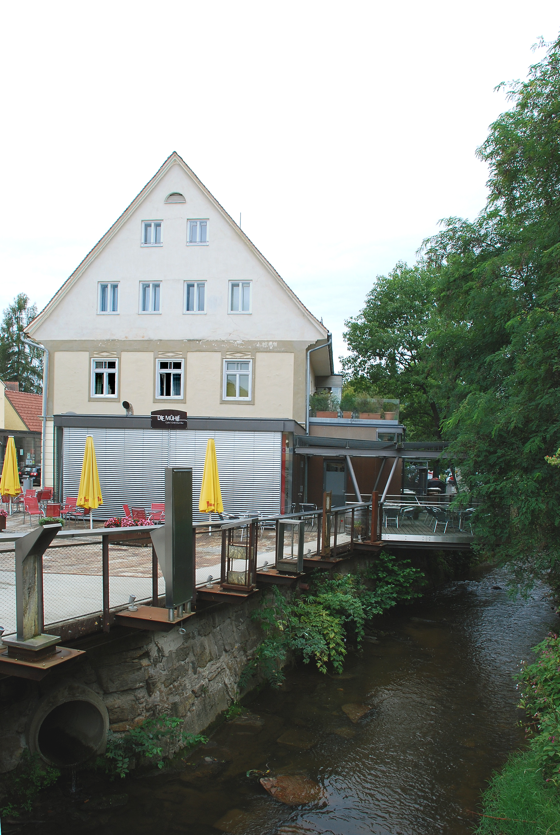 Stainz, Steiermark, Österreich: Haus Rathausplatz 2 Stainz Bruggenmühle am Stainzbach Object location46° 53′ 38.72″ N, 15° 15′ 48.27″ E